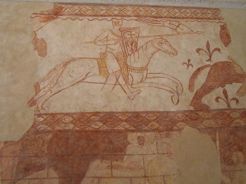 fresque de la chapelle des templiers de Cressac